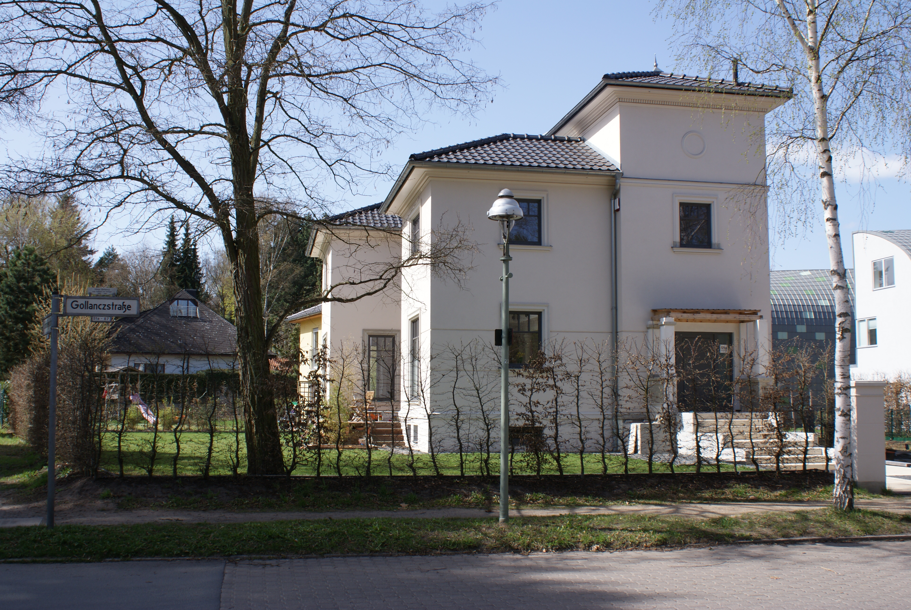 Berlin, Gollanczstr Ecke Schönfließer Str